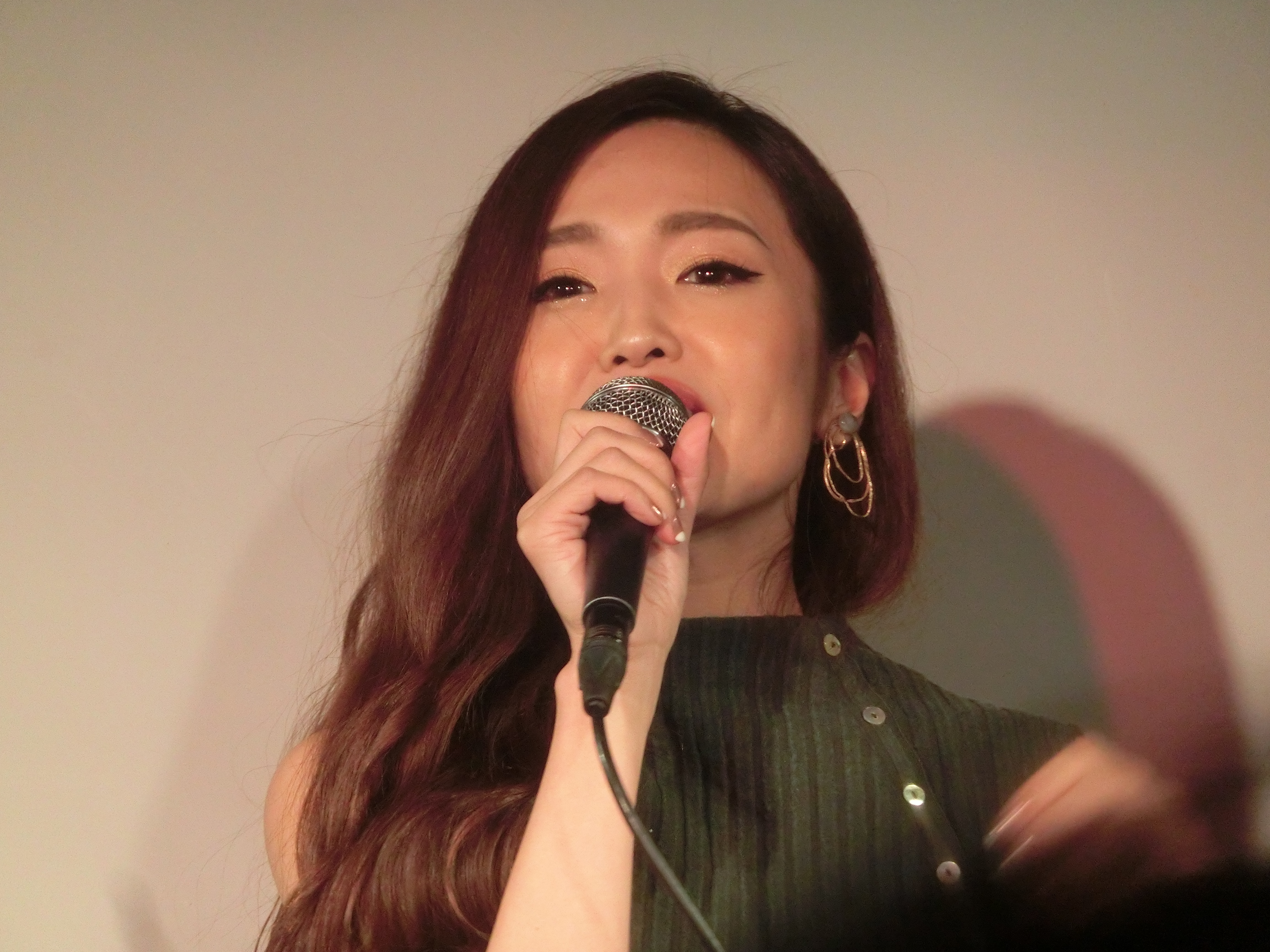 2019年10月6日、Adult video supporting actress prize